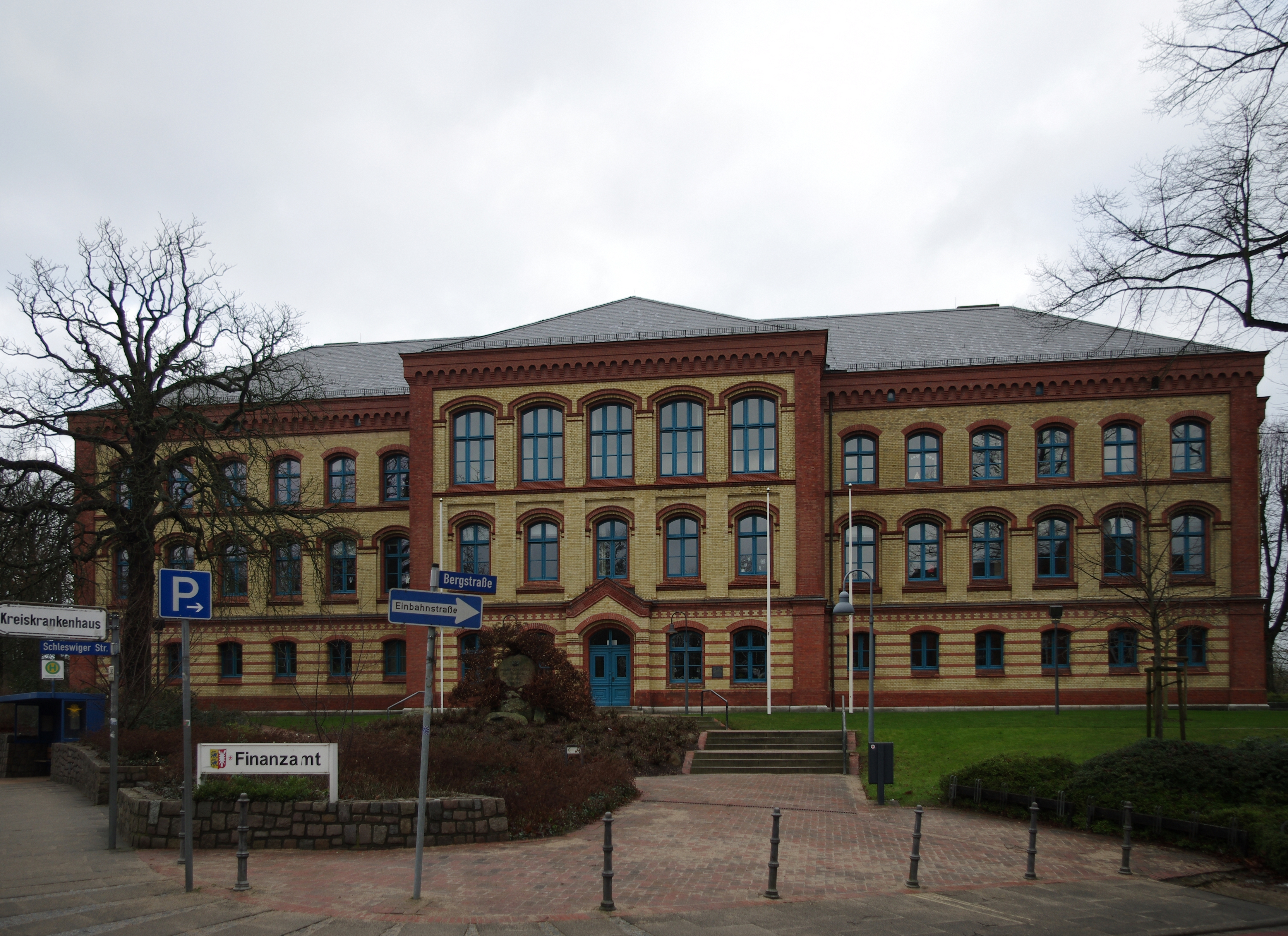 Eckernförde in Schleswig-Holstein. Das Finanzamt in der Bergstraße steht unter Denkmalschutz.